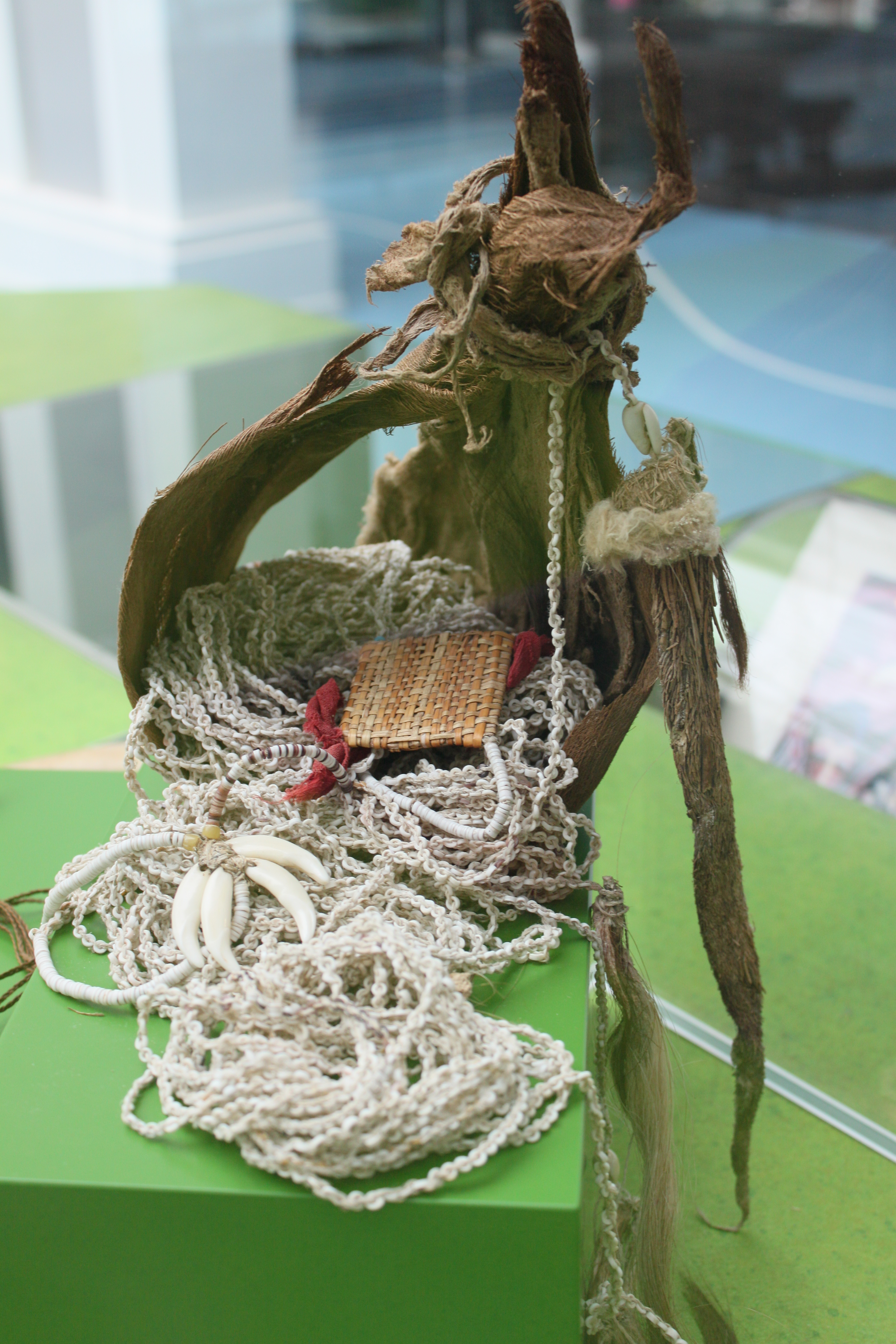 Muschelgeld; Insel Neuirland im Bismarck-Archipel; Papua Neuguinea; um 1900